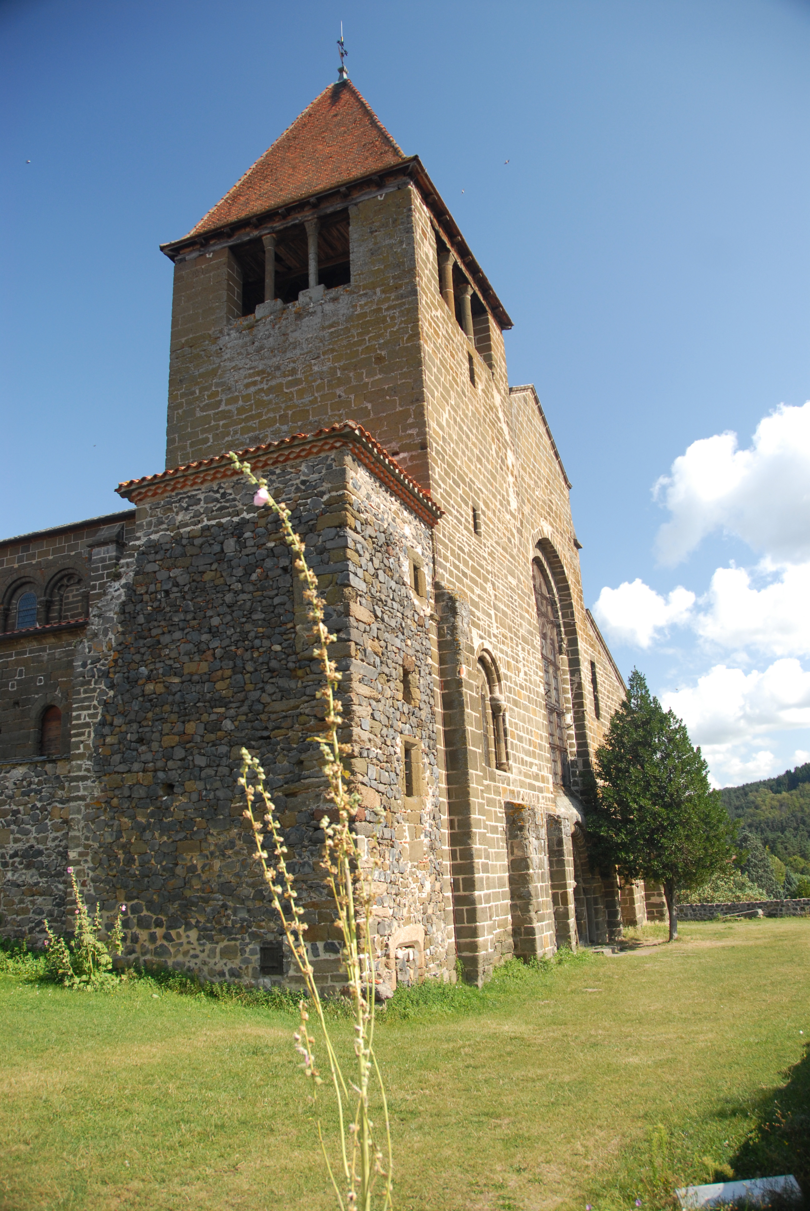 Chanteuges, Kirche, Fassade, Turm u. Treppenturtm v.NW